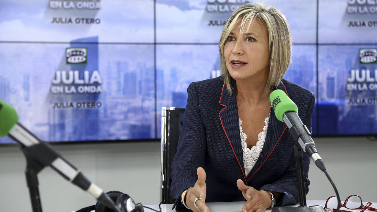 Julia Otero en Onda Cero